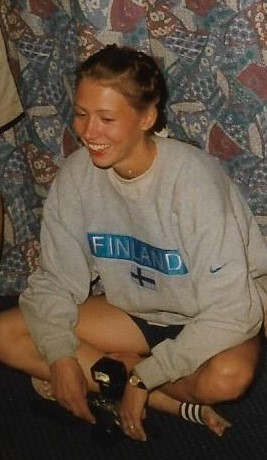 Petra Söderström (myöh. Stenman) Suomen joukkueen mitalikahvitilaisuudessa yleisurheilun Euroopan-mestaruuskilpailuissa Budapestissa 23. elokuuta 1998.